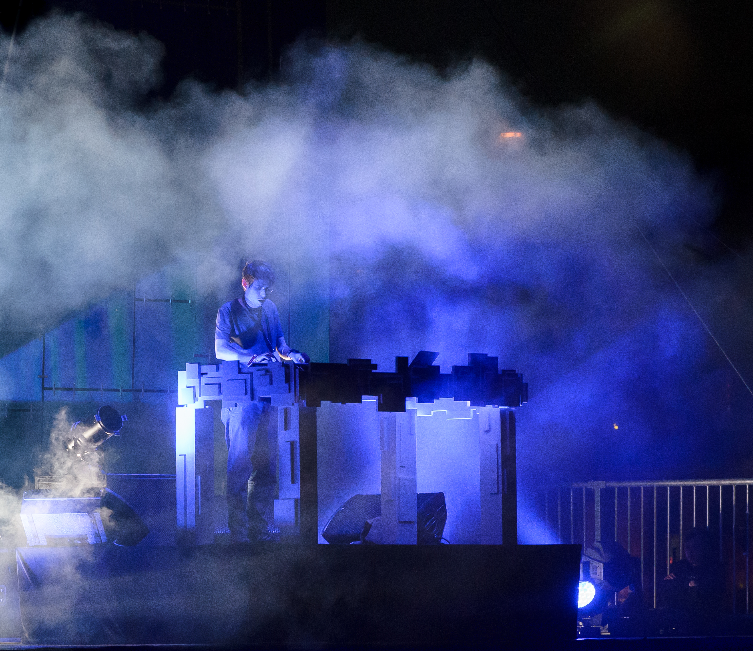 Rone (Erwan Castex) en concert sur le lac d'Enghien-Les-Bains le 15 juin 2013.